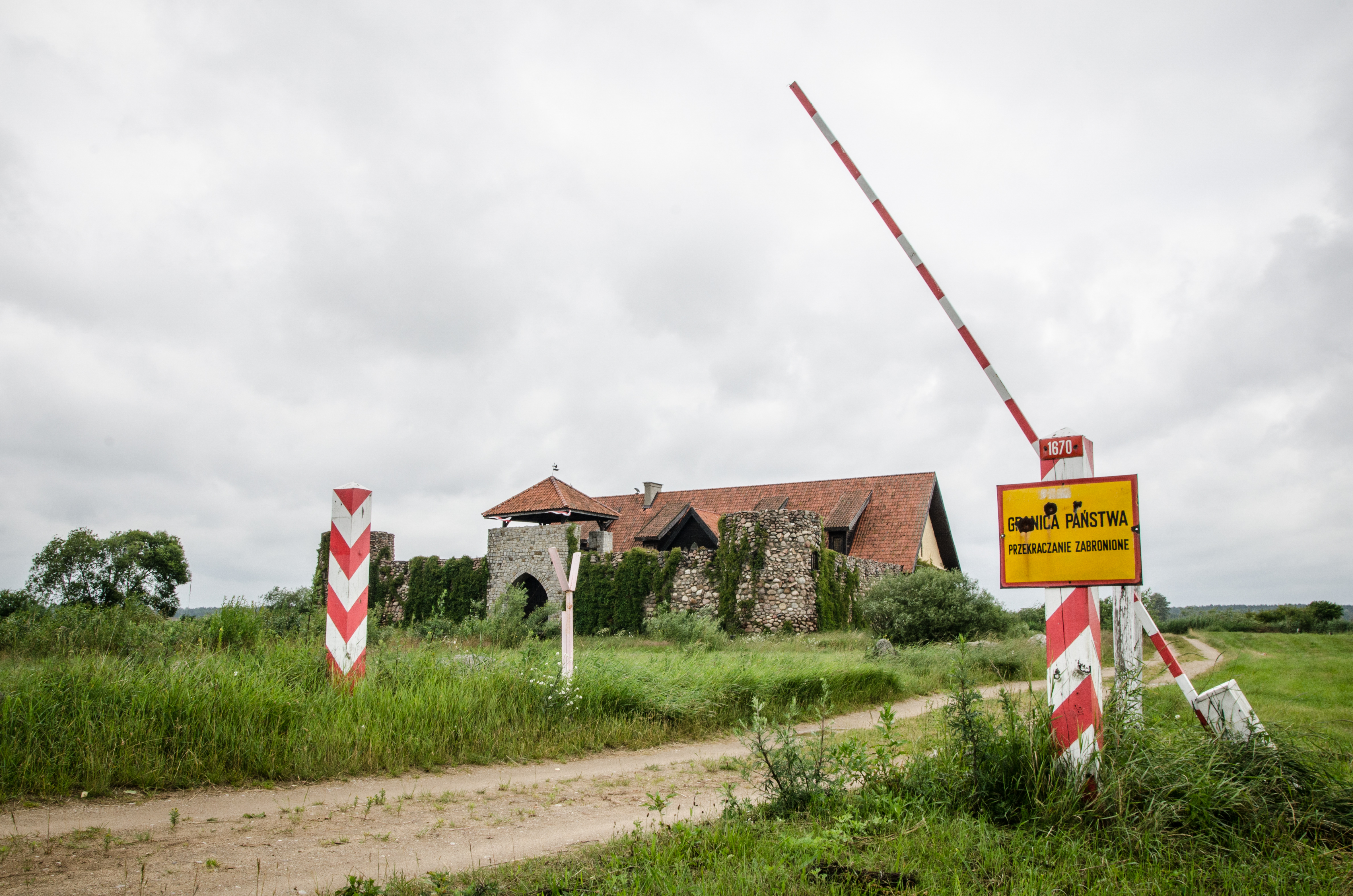 Zrekonstruowane przejście graniczne na dawnej granicy dzielącej Rzeczpospolitą i Wielkie Księstwo Litewskie - Jantarowy Kasztel, Kiermusy